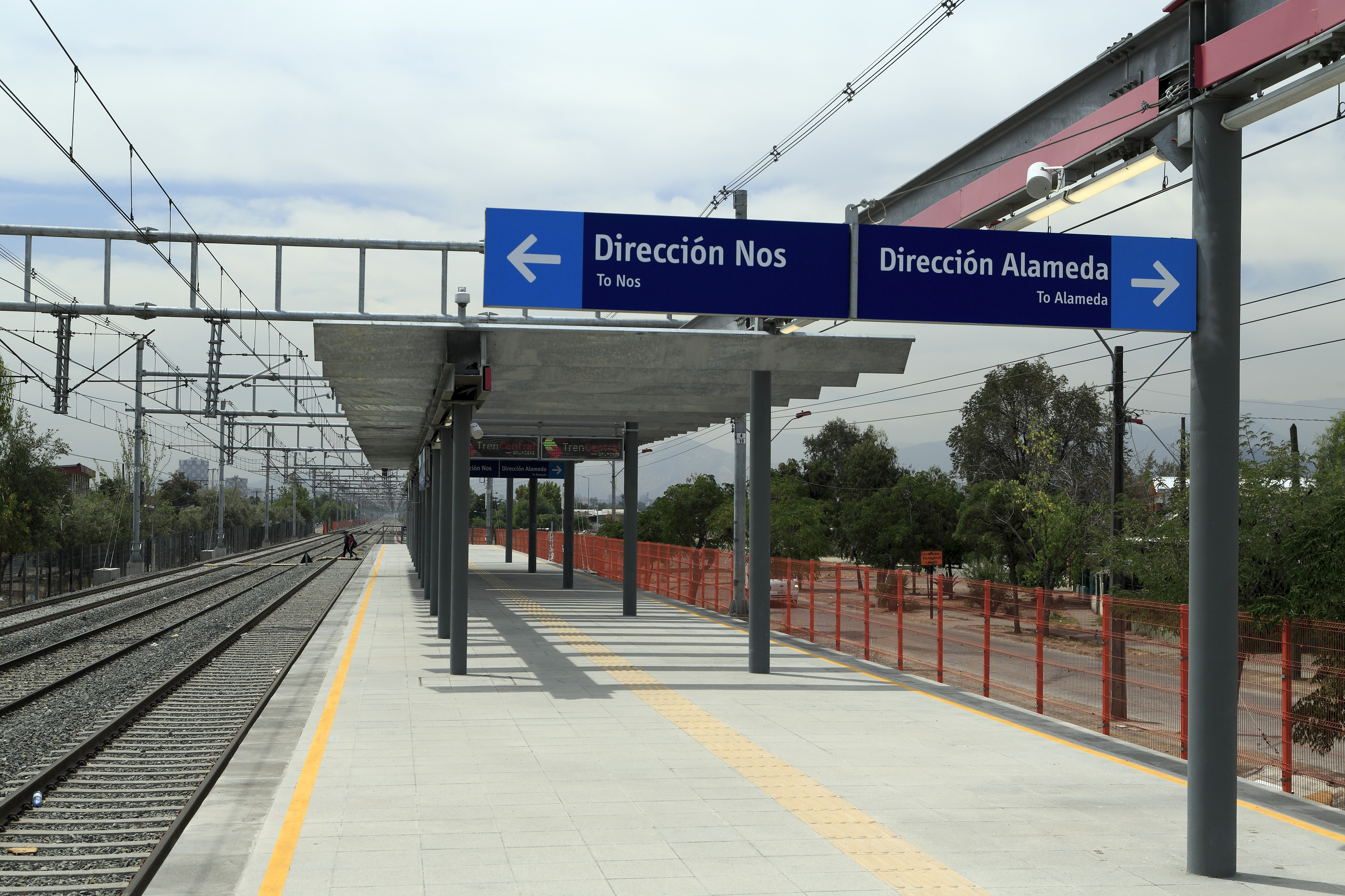 Richtung Norden, zusätzlich zur kastillischen Beschriftung hat man auch englisch verwendet. Damit dürften 98% der potentiellen Reisenden versorgt sein. Das Bahnsteigach ist bis auf ein kleines Stück nur ein Sonnenschutz. Beim mediterranen Klima von Santiago ist diese Konstruktion durchaus passend.